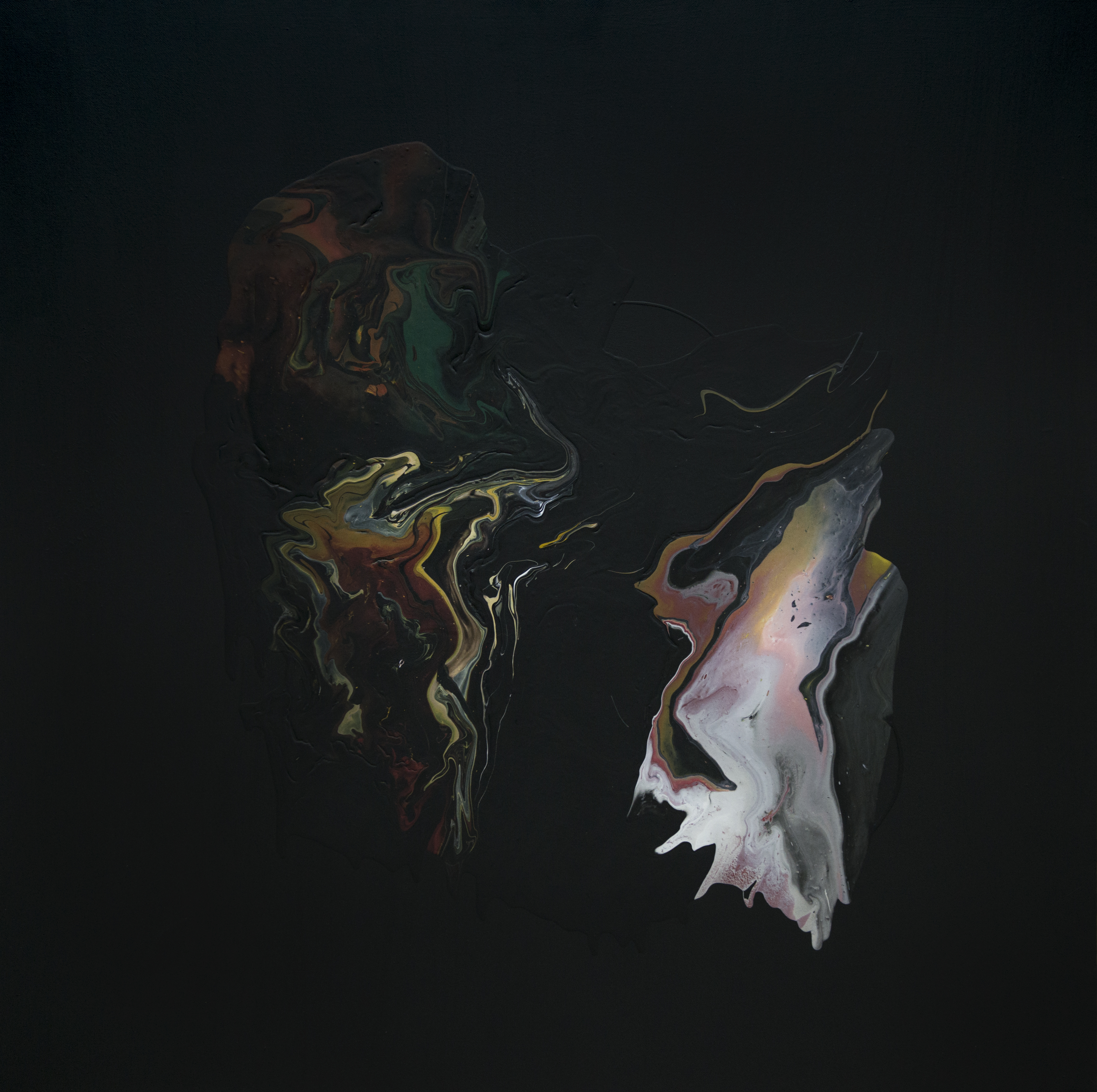 Srpskohrvatski / српскохрватски: Couple - Akril na platnu 100x100cm - Natalija Miladinović 2018.